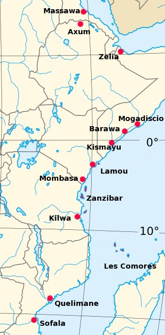 Principales villes et îles originaires de la culture swahilie. Fabriqué à partir de la carte d'afrique Image:Africa map political.svg et avec The Gimp. Auteur Vincnet G